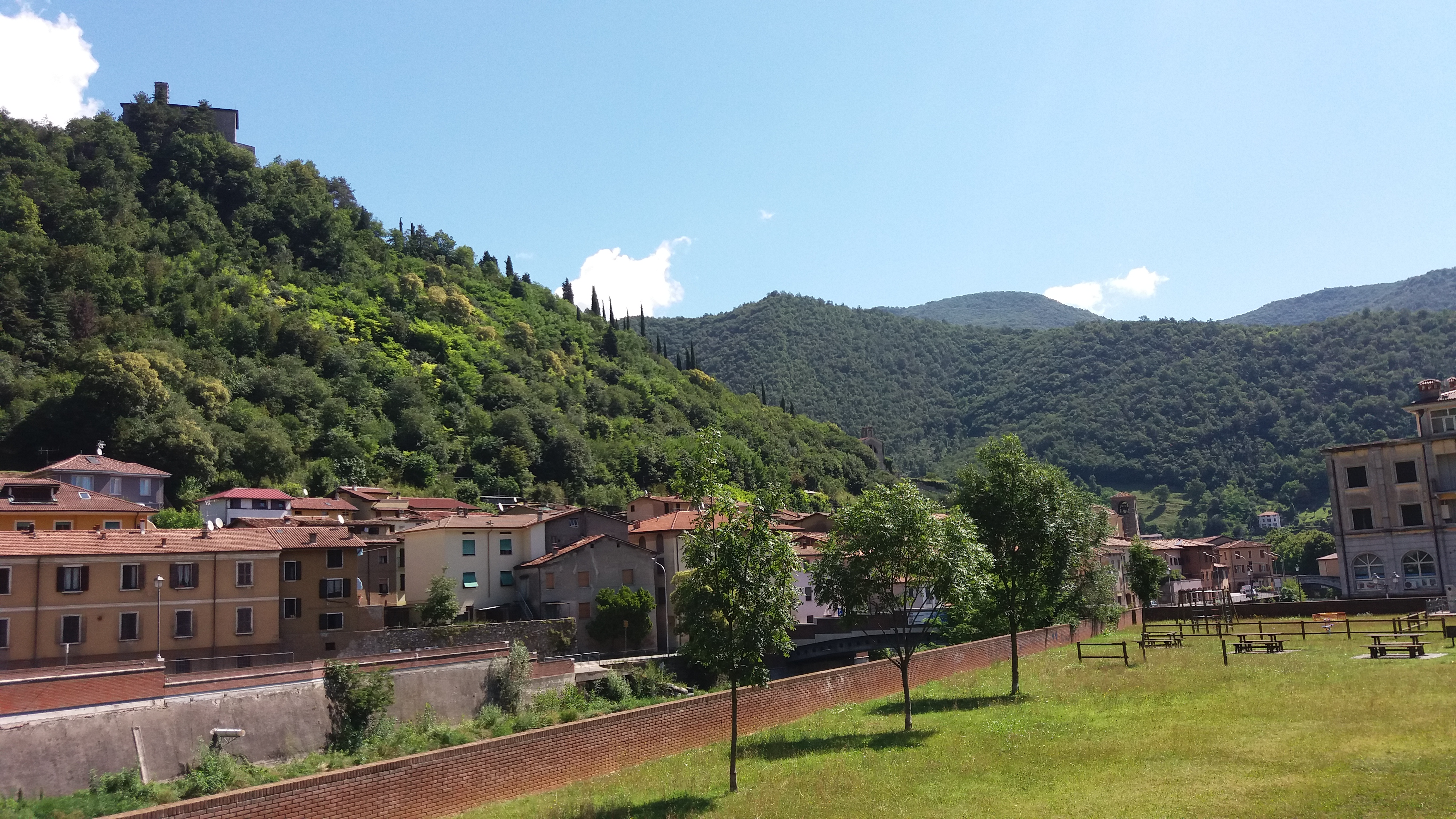 Vobarno, provincia di Brescia, la Rocca e la pieve di santa Maria